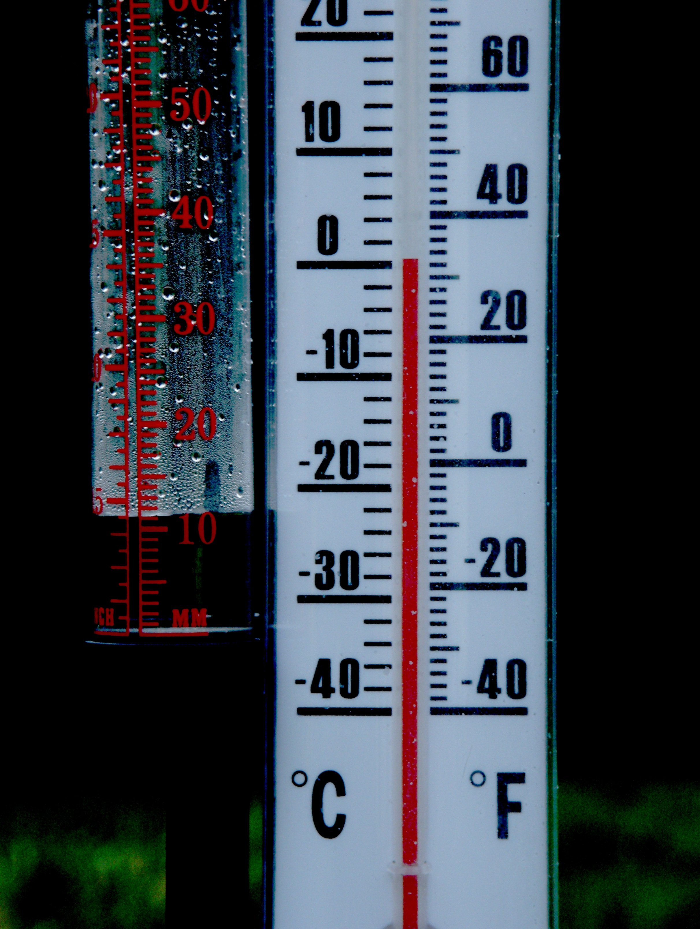 Zero Celsius, 32 Fahrenheit